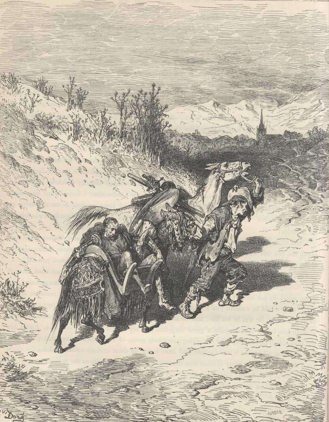 "Dom Quixote é ajudado por um lavrador seu vizinho", iIustração por Gustave Doré para “Don Quixote“ de Miguel de Cervantes.